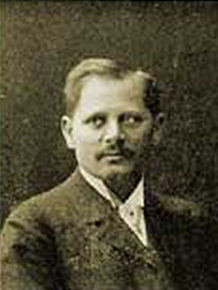 Königlicher Musikdirektor - Max Filke - Fest-Dirigent